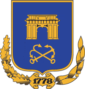 Герб города Херсон, Украина с 1995 по 2005 год.